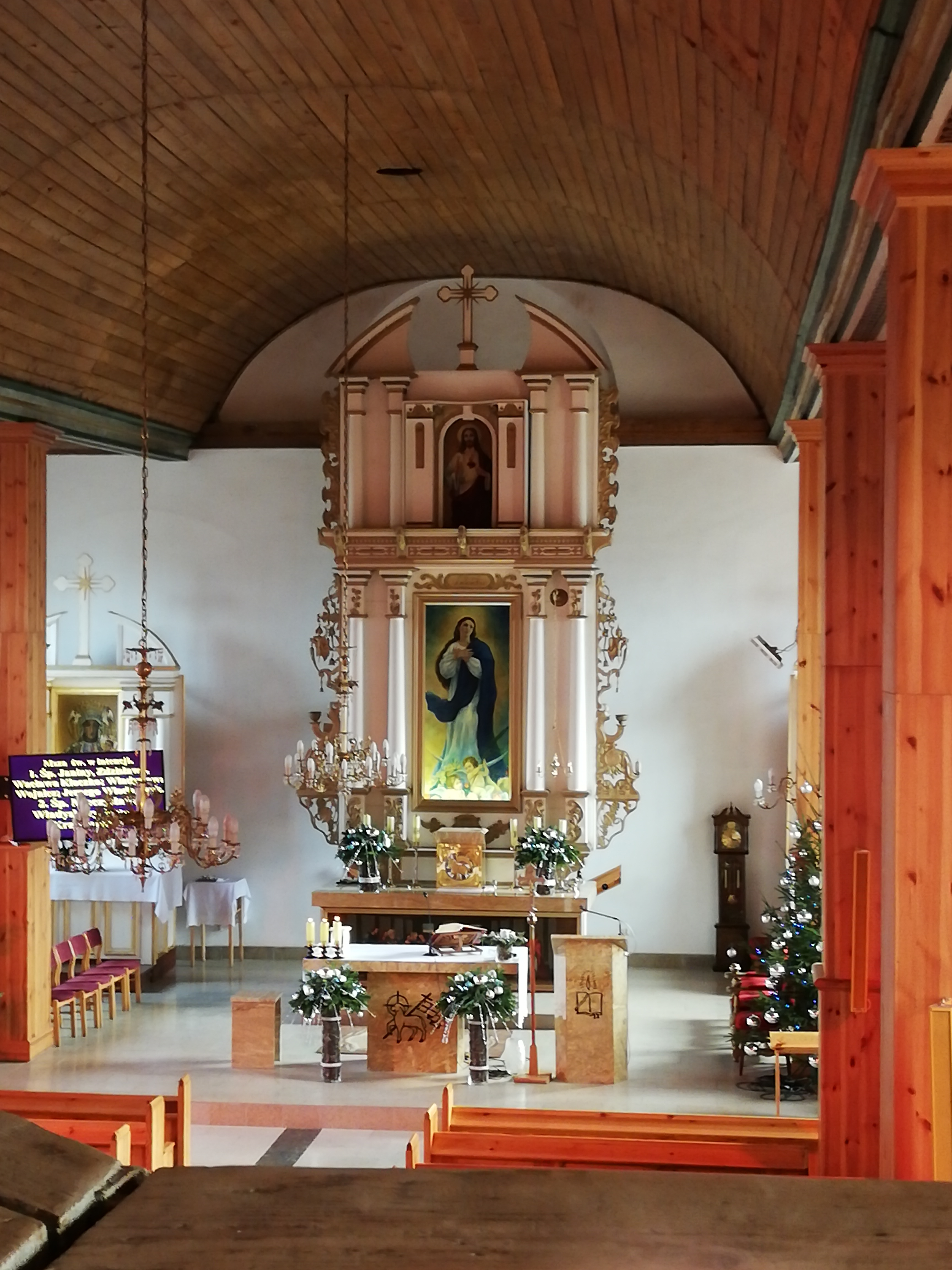 Ołatrz główny kościoła Wniebowzięcia Najświętszej Maryi Panny w Kruklankach